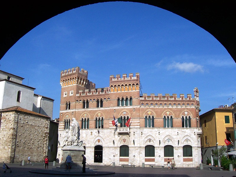 Grosseto - Palazzo Aldobrandeschi